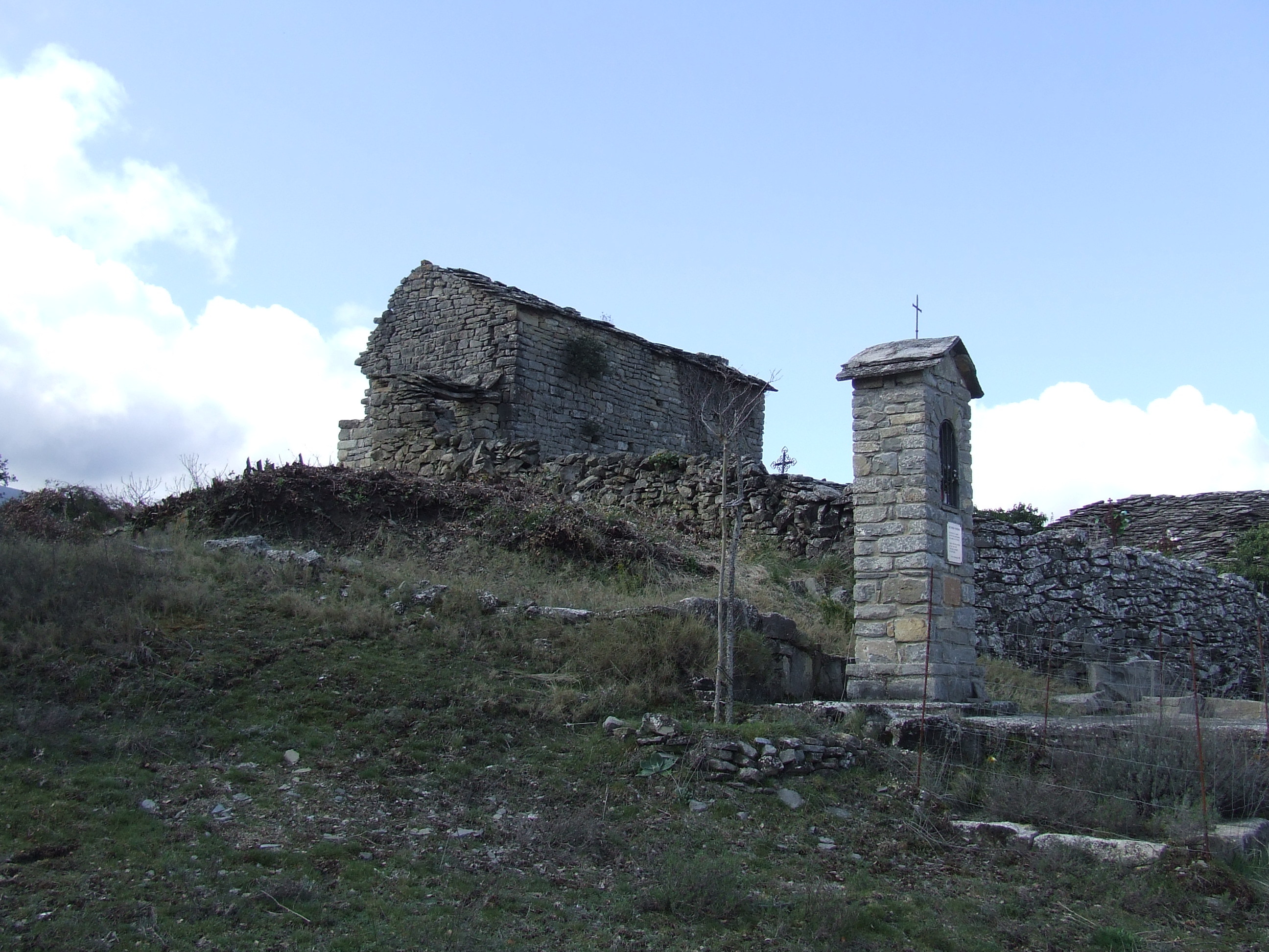 Costats nord i est de Santa Maria de la Torre d'Amargós (Sant Esteve de la Sarga, Pallars Jussà)